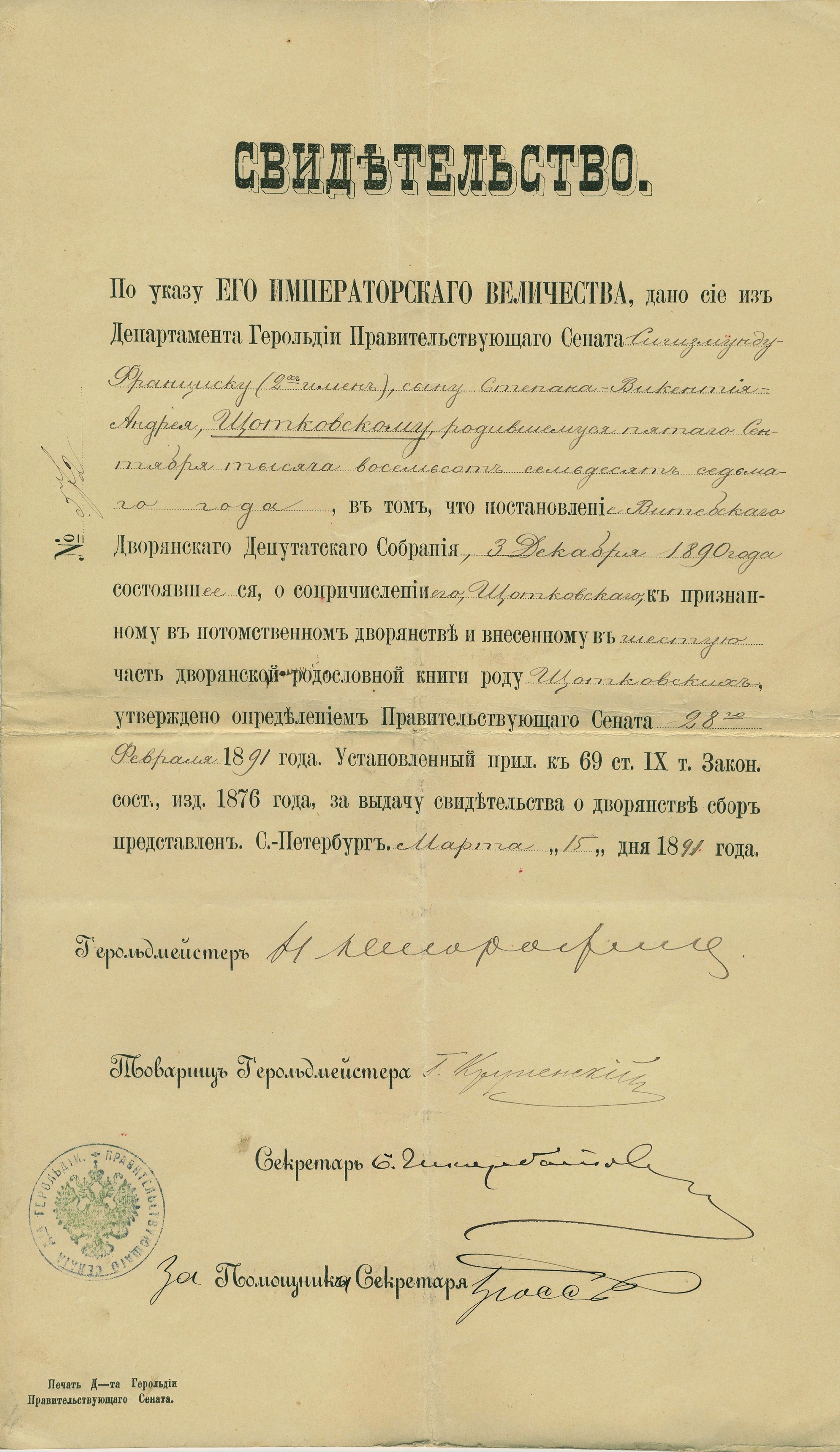 Świadectwo heroldii rosyjskiej